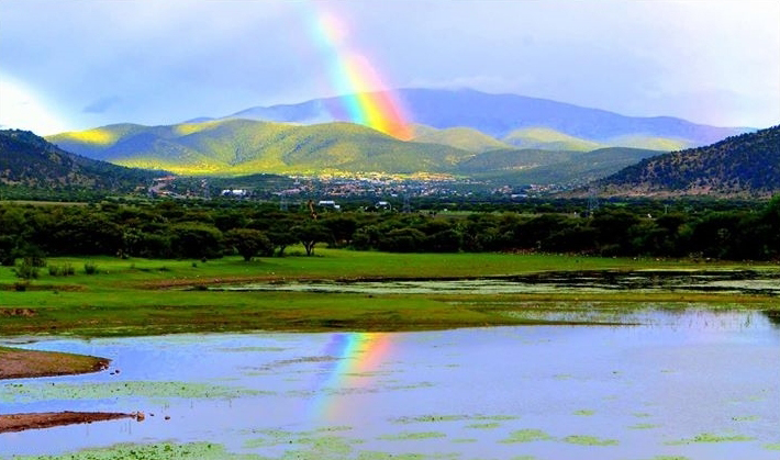 Villa insurgentes6